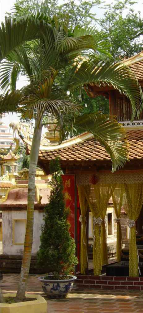 Adonidia merrillii (syn. Veitchia merrillii)